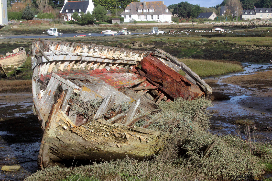 Epave de bateau de pêche